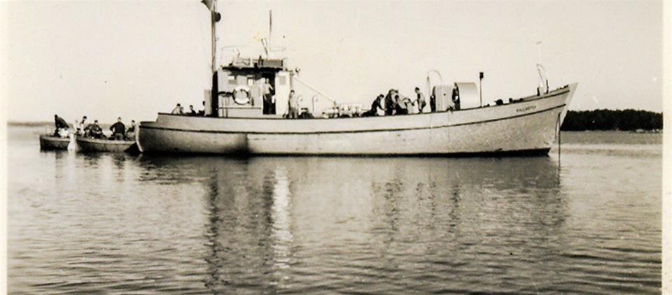 raivaaja